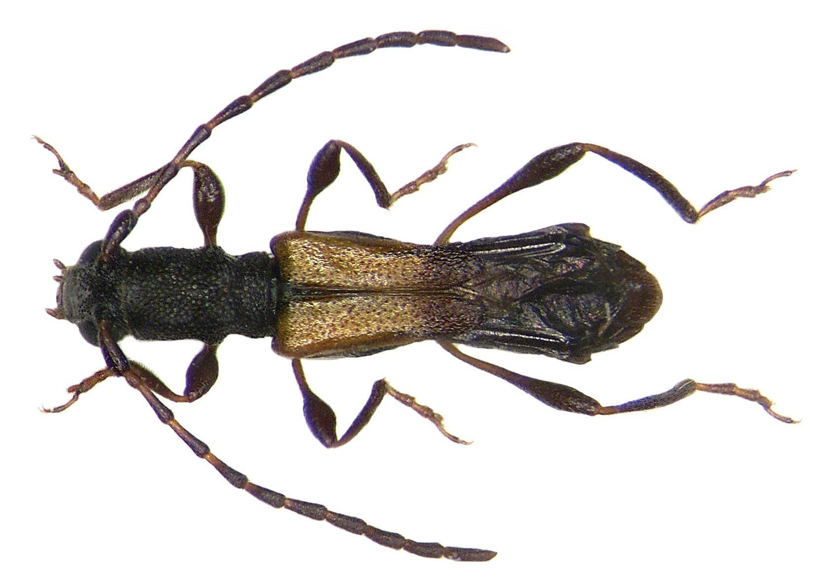 Familie: Cerambycidae Grösse: 5-7 mm Verbreitung: Südeuropa, Nordafrika Fundort: Italien, Prov. Pisa, Ponteginori leg. det. G.Rössler, 1987 Foto: U.Schmidt, 2006